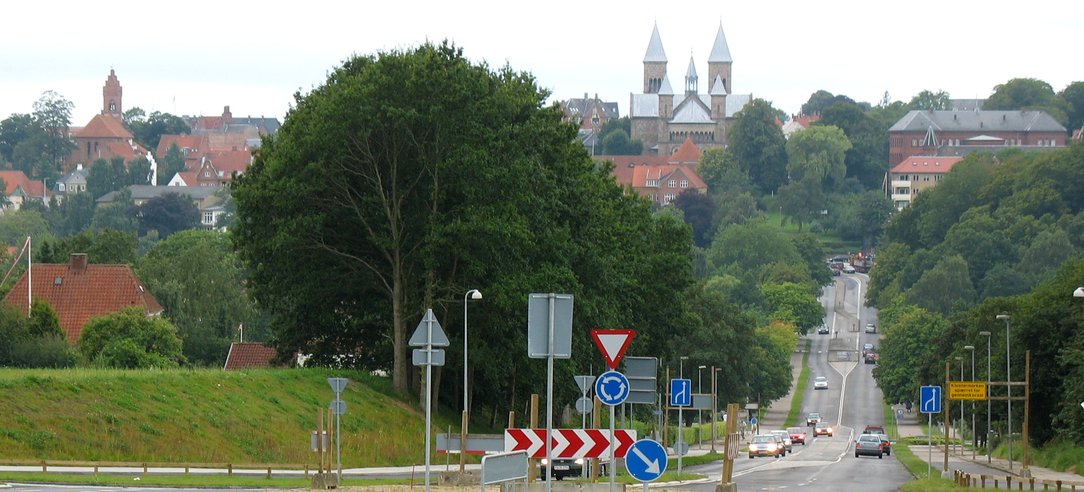 Viborg set fra øst.